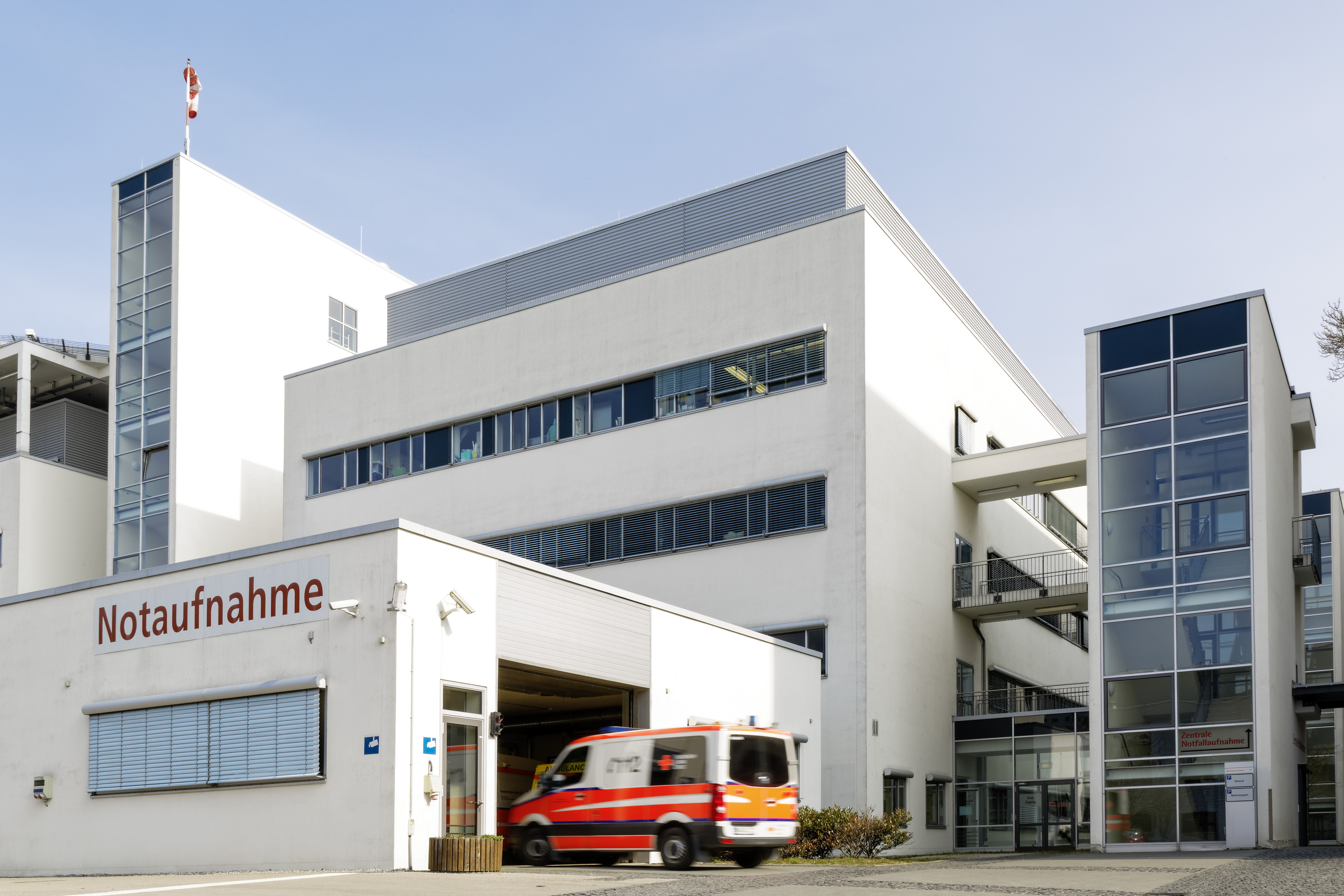 Mehr als 30.000 Patienten werden jährlich in der Notaufnahme des Universitätsklinikums Jena behandelt.